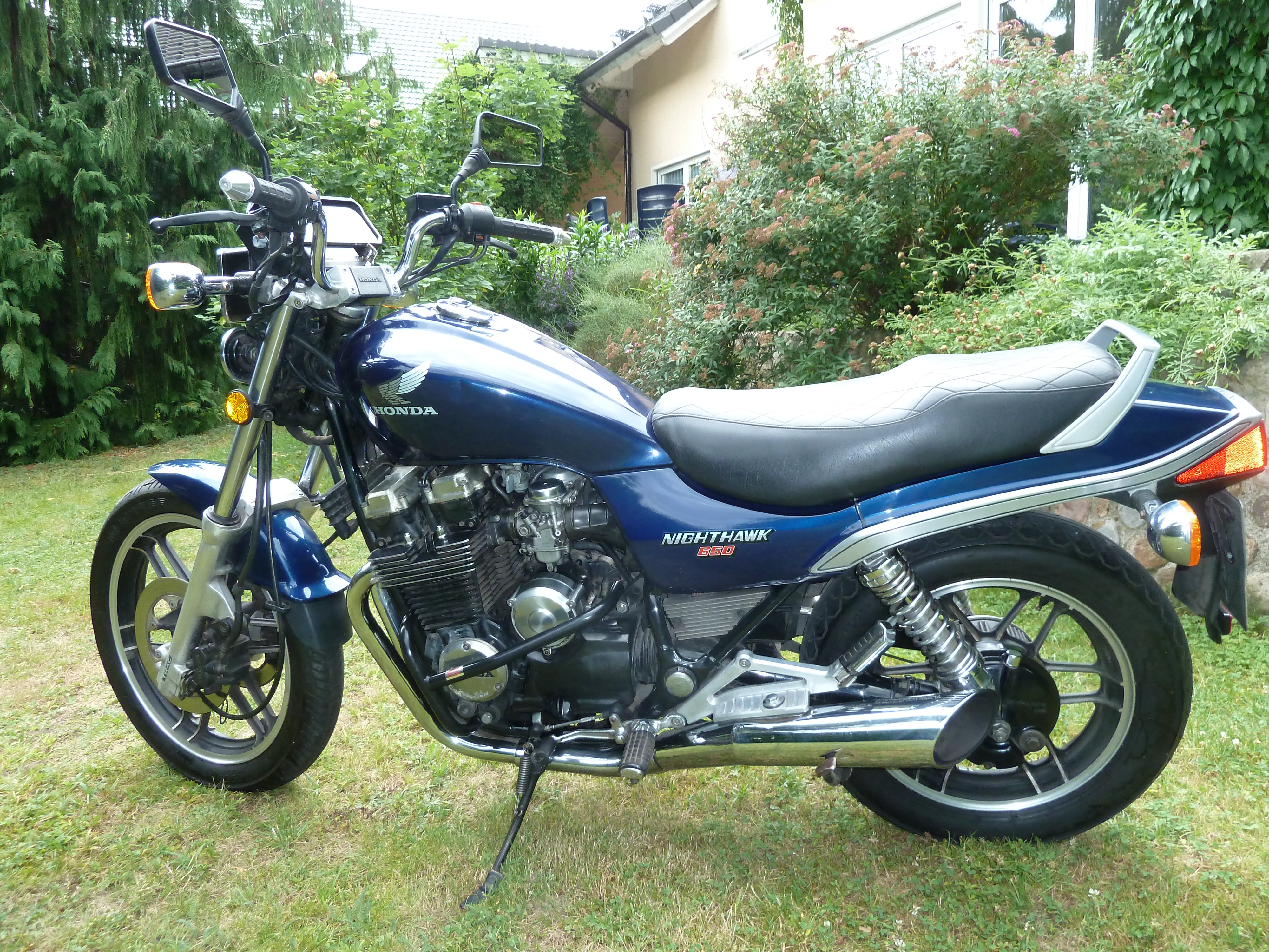 Honda Nighthawk, 1985. Photo made by the owner, Andreas Koll in 2016